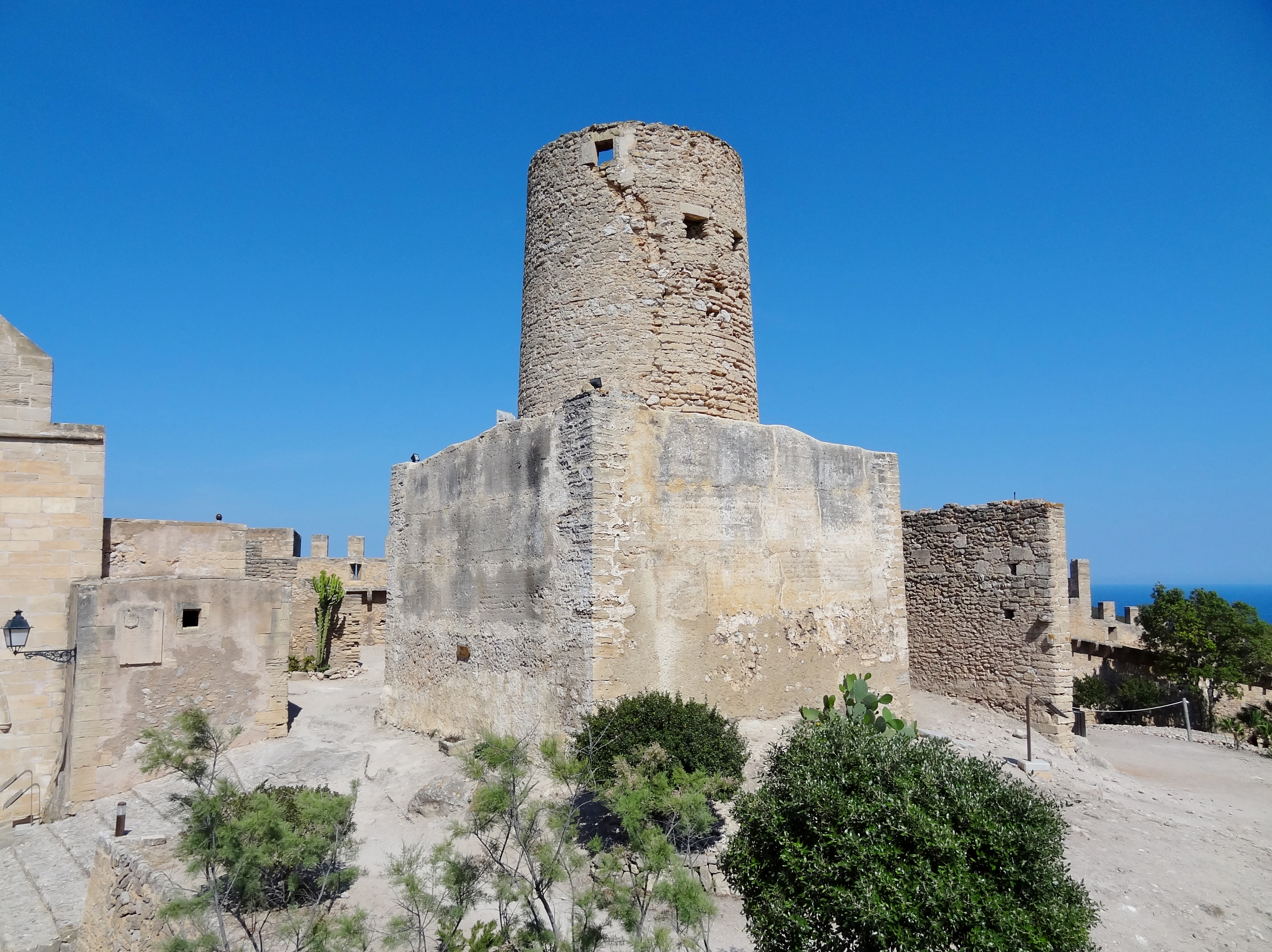 Castell de Capdepera, Gemeinde Capdepera, Mallorca, Spanien